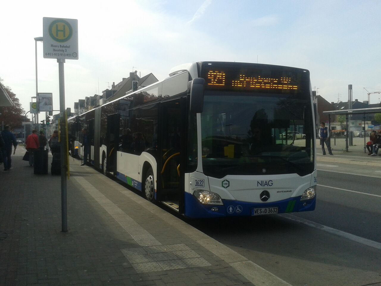 Ein NIAG-Bus der Linie 929 nach Duisburg Hbf am Bahnhof Moers.